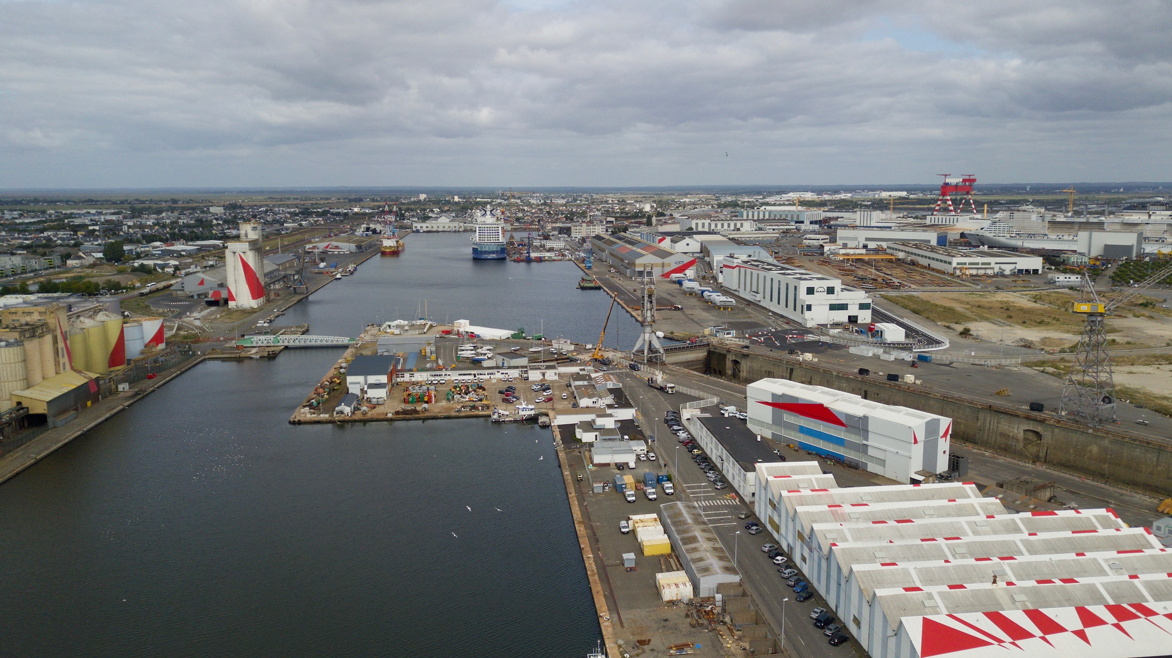 Vue des chantiers de l'Atlantique depuis le bassin de Penhouët